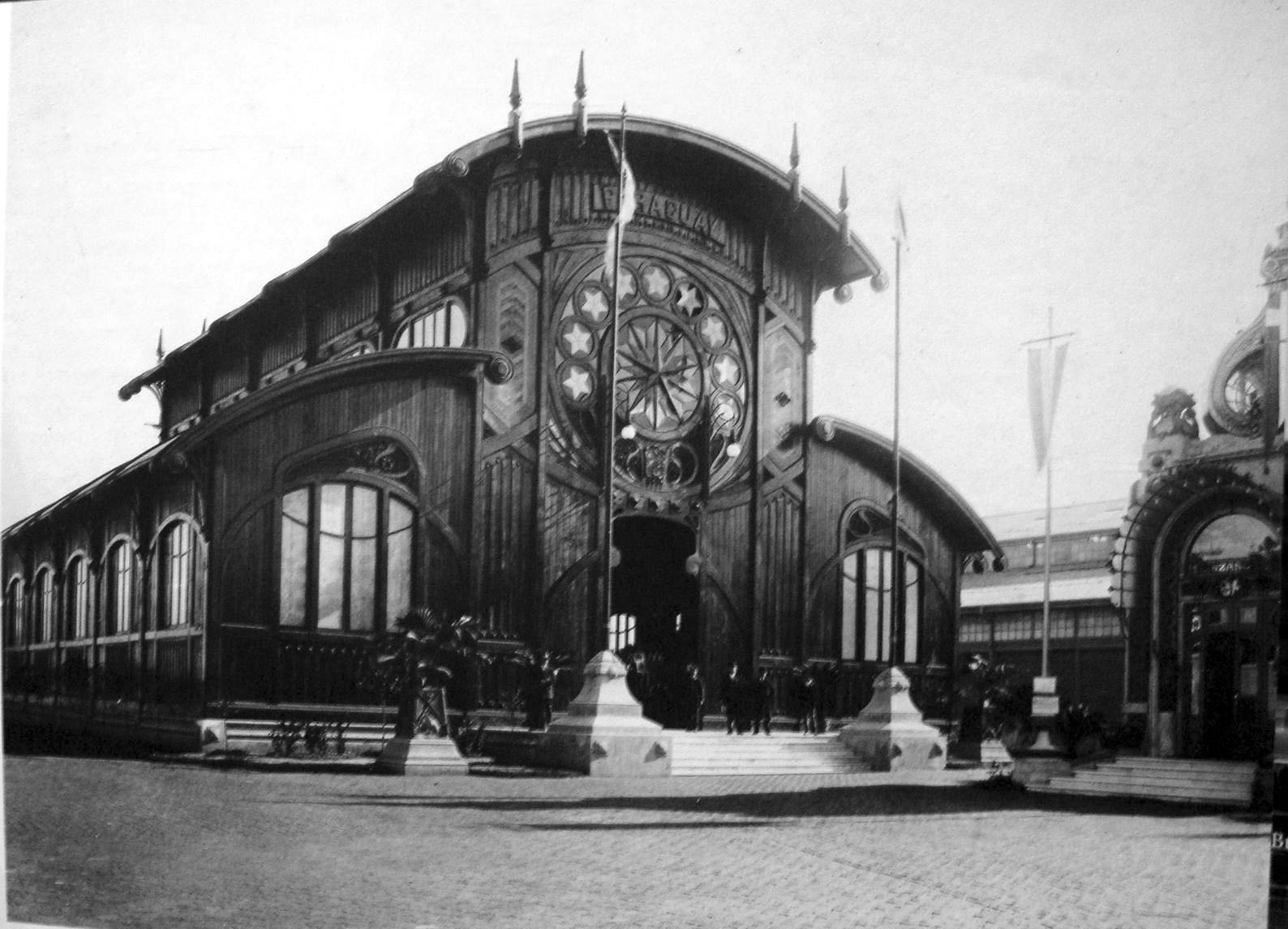 El Pabellón del Paraguay en la Exposición de Agricultura de la Exposición Internacional del Centenario de la Revolución de Mayo, realizada en Buenos Aires durante 1910.